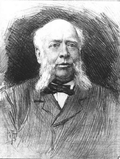 Portret van de Haagse uitgever Martinus Nijhoff (1826-1894)